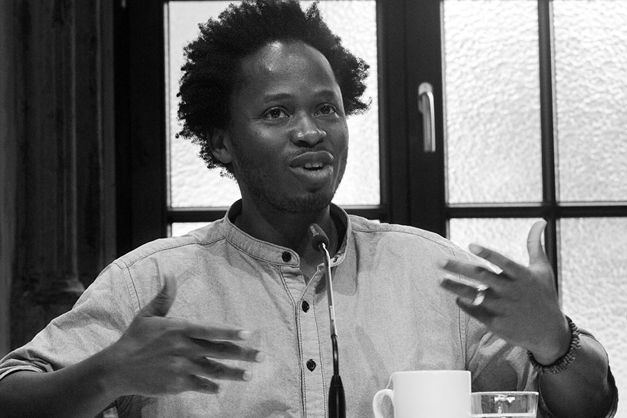 Am 28.06.2016 las im Literaturhaus Köln Ishmael Beah aus seinem Roman "Das Leuchten von Morgen" Moderiert wurde die Lesung vom Schriftsteller Ilija Trojanow ( „Der Weltensammler“ )